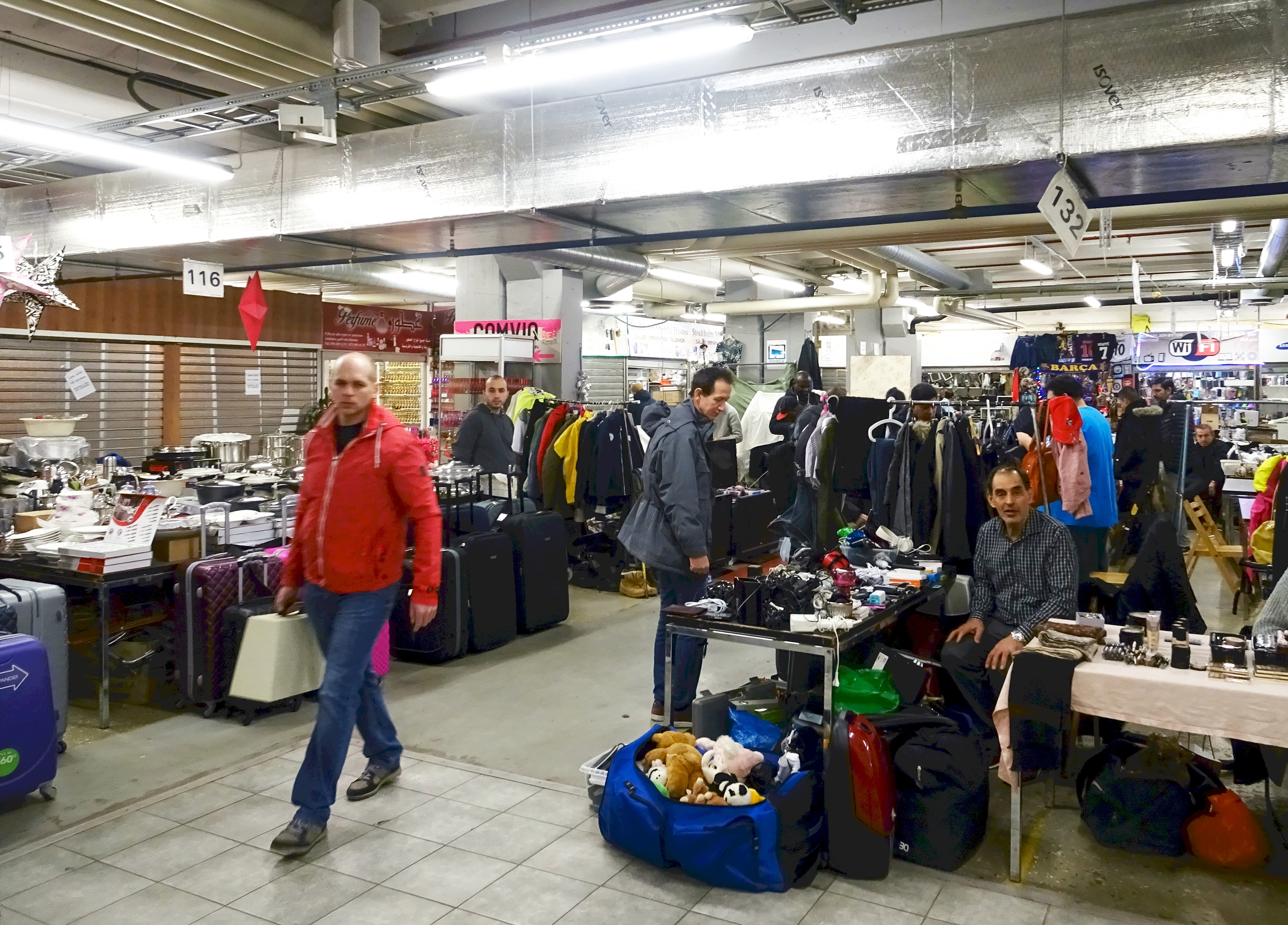 Skärholmens loppis i Vårberg centrum, entré